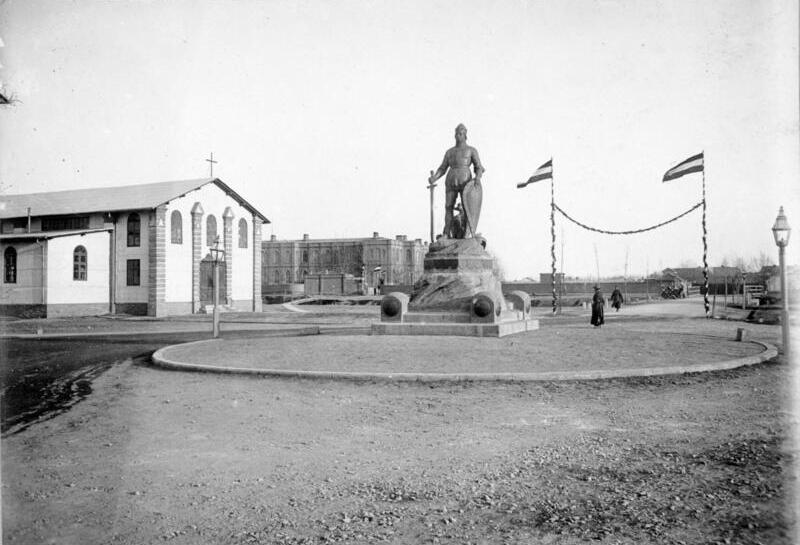 Die Enthüllungsfeier des Deutschen Kriegerdenkmals am 17ten Juni 1905 zu Tientsin Der Roland